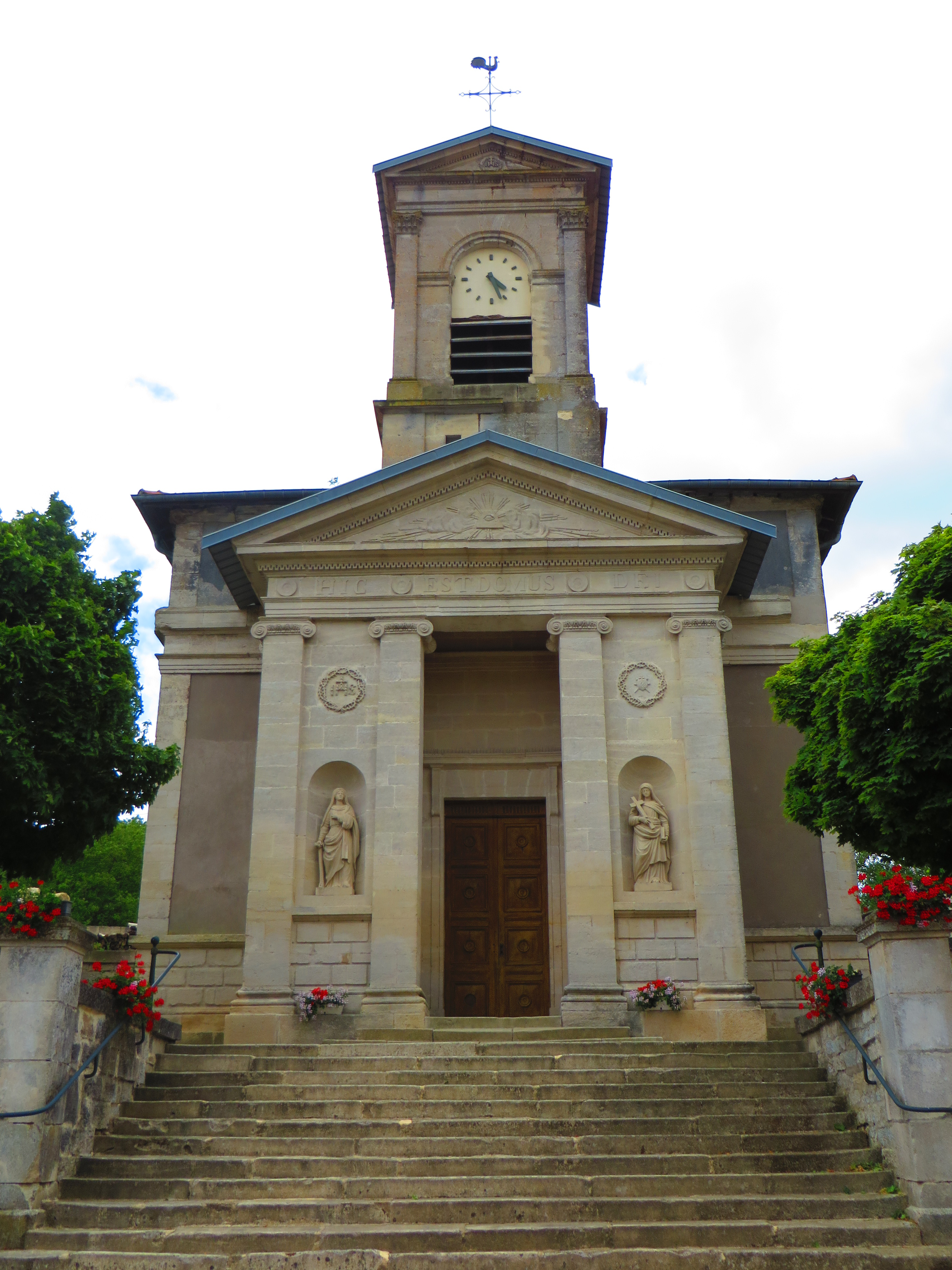 Senoncourt-les-Maujouy L'église de la Nativité-de-la-Bienheureuse-Vierge-Marie